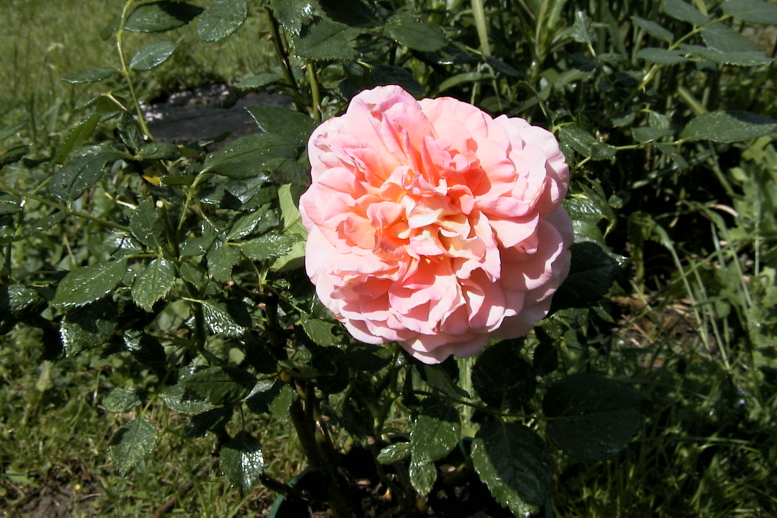 Rosa 'Augusta Luise', Tantau 1999